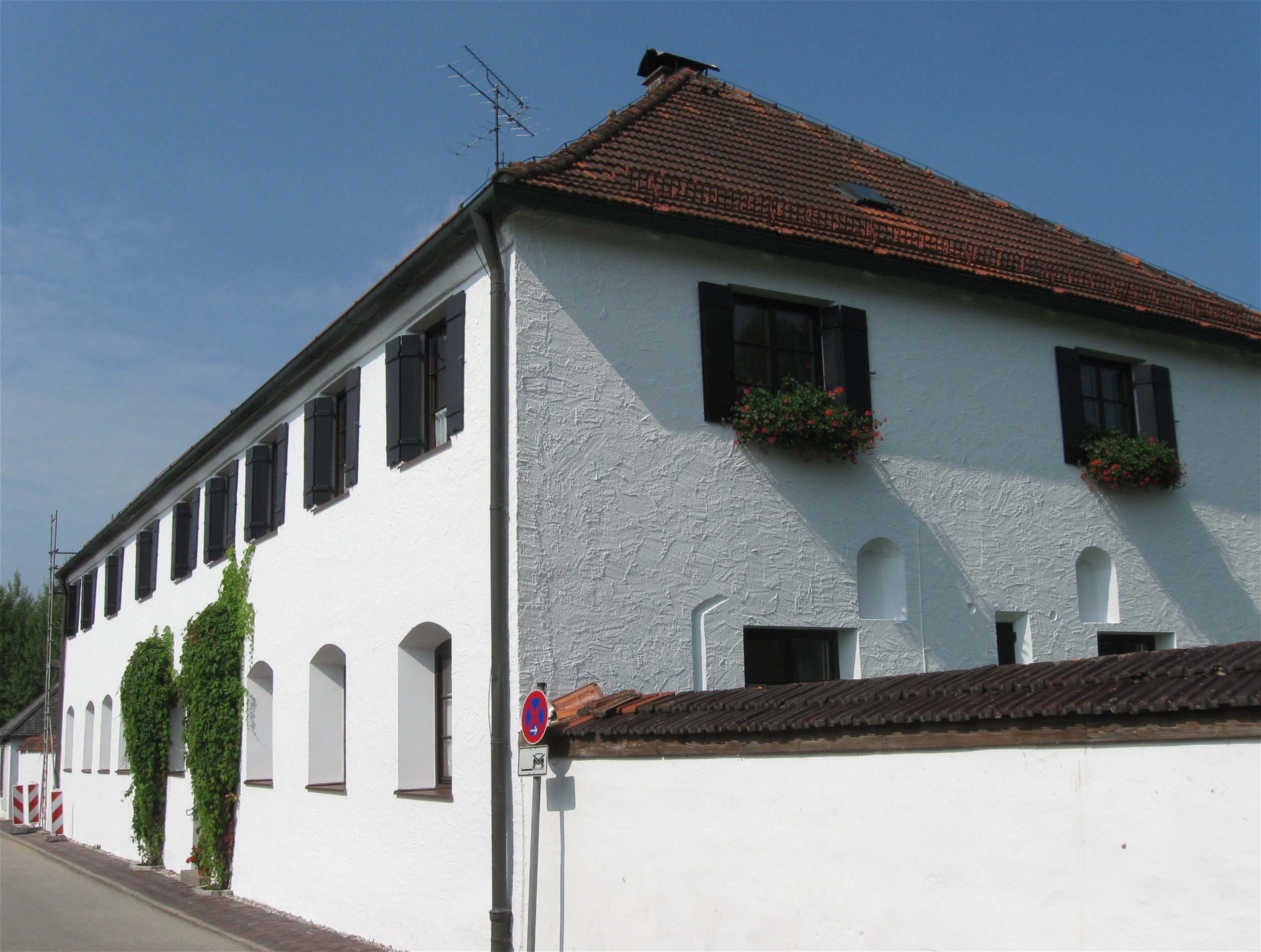 Klosterweg 14; Pfarrhof, ehemaliges Hofrichterhaus, lang gestreckter, zweigeschossiger Putzbau mit Walmdach, im Kern spätmittelalterlich, barockzeitlich und im 19. Jahrhundert überformt; Gartenmauern, zum Klosterweg mit einem eingemauerten Relief, bezeichnet mit dem Jahr 1605, und Nische mit Figur des hl. Johann Nepomuk, 18. Jahrhundert.